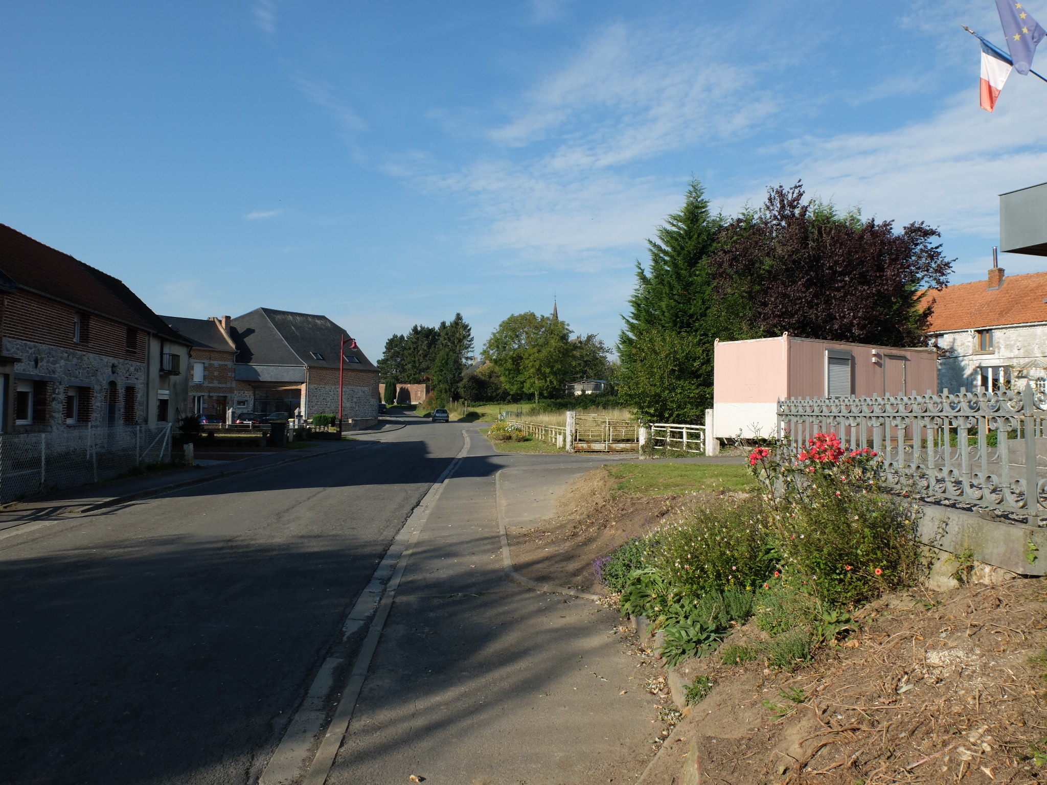 Vue de la Grand Rue de Sassegnies à côté du monument aux morts. Au fond, le clocher de l'église est visible.